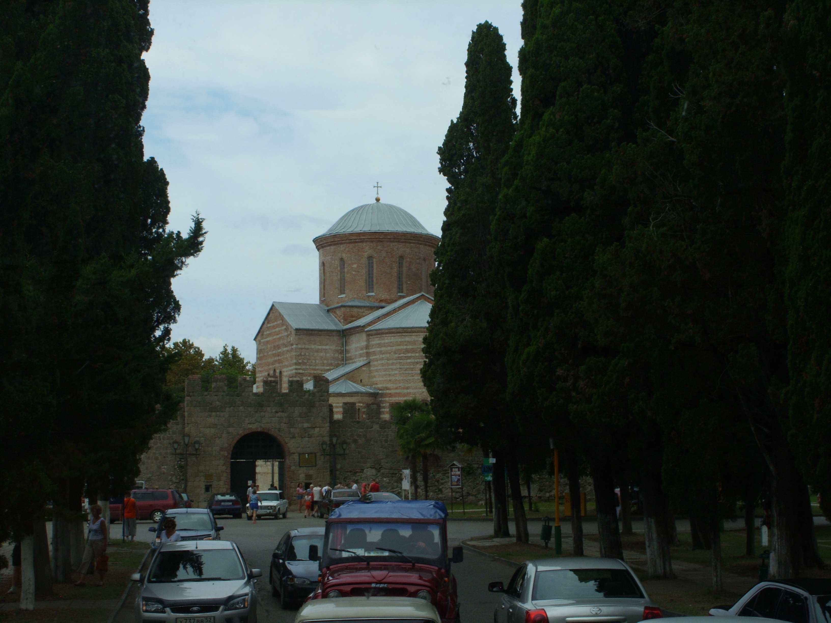 Снимок июля 2009 г. Автобусная экскурсия из Сочи